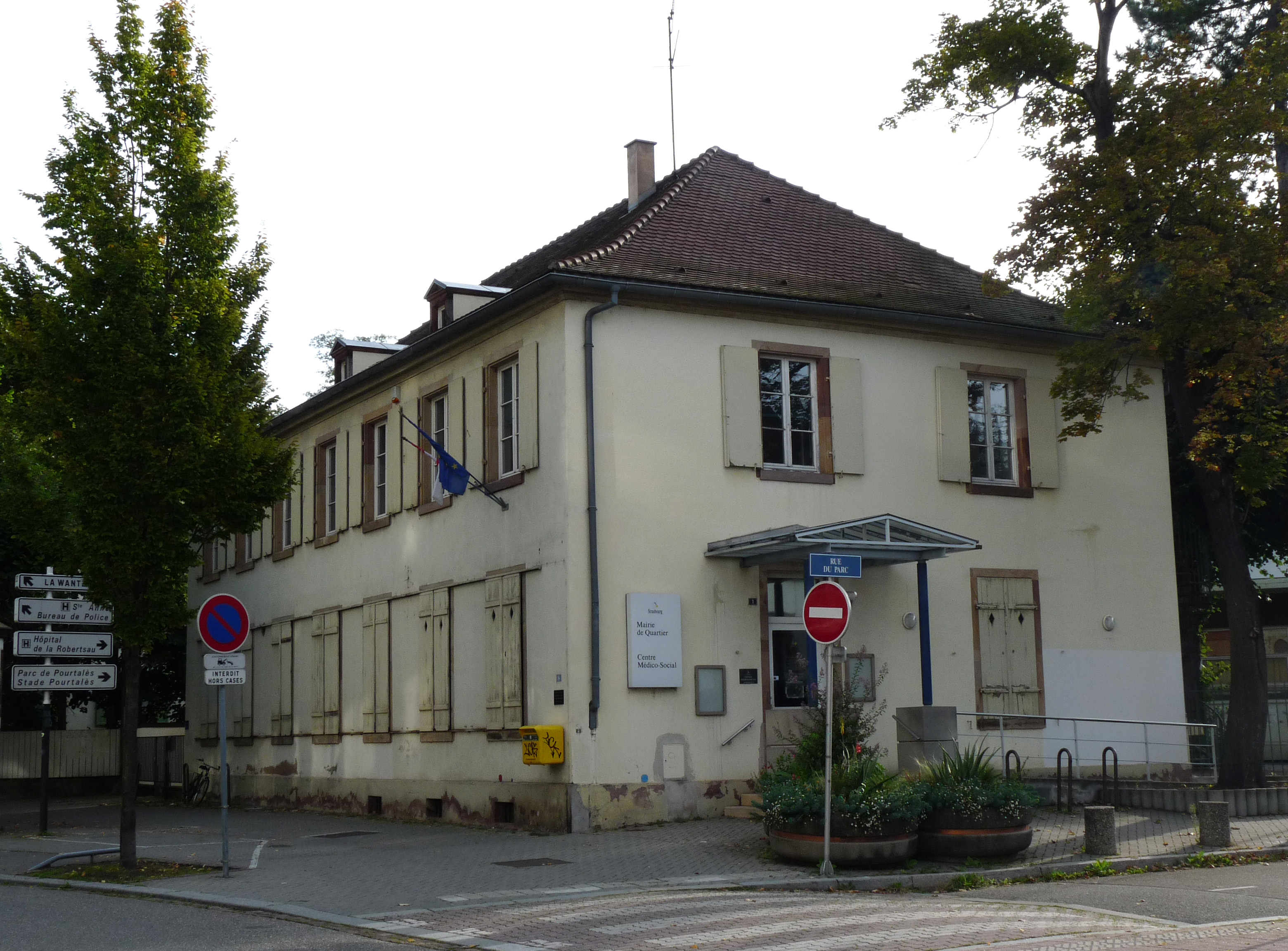 Mairie de quartier et centre médico-social de la Robertsau, à l'angle de la rue Boecklin et de la rue du Parc, Strasbourg.